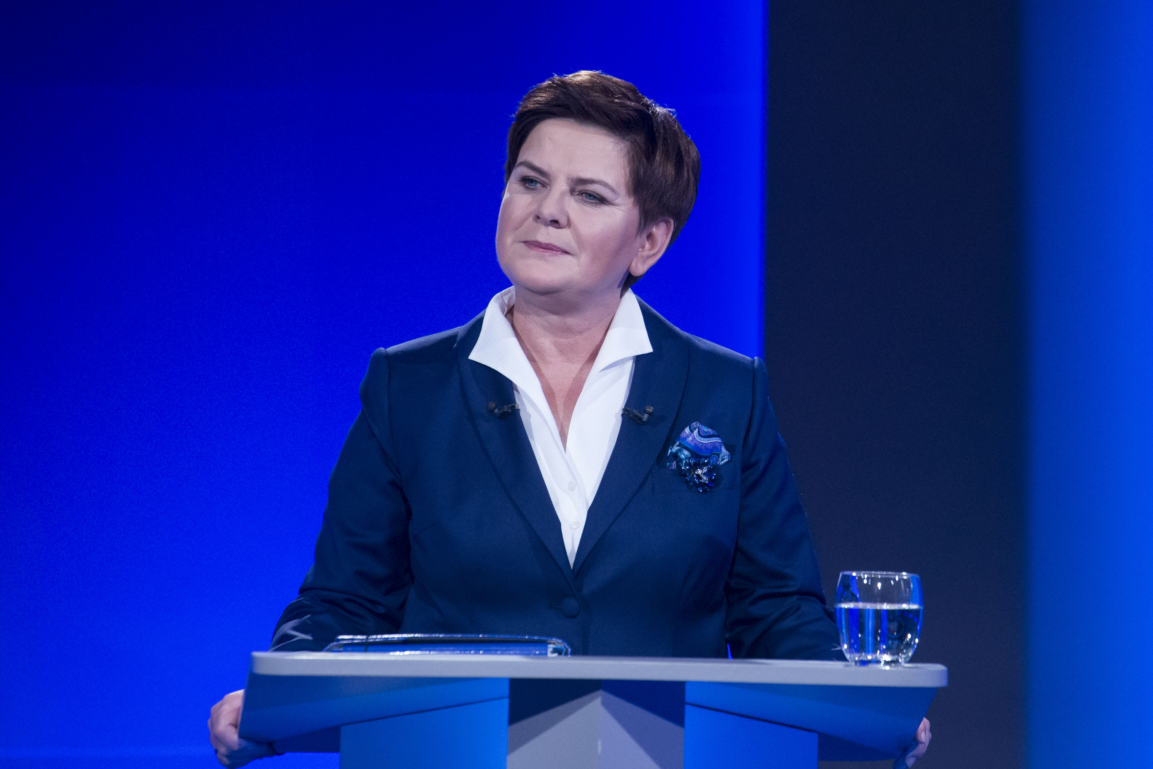 "Rozmowa o Polsce" - debata Premier Ewy Kopacz z Beatą Szydło, 19.10.2015